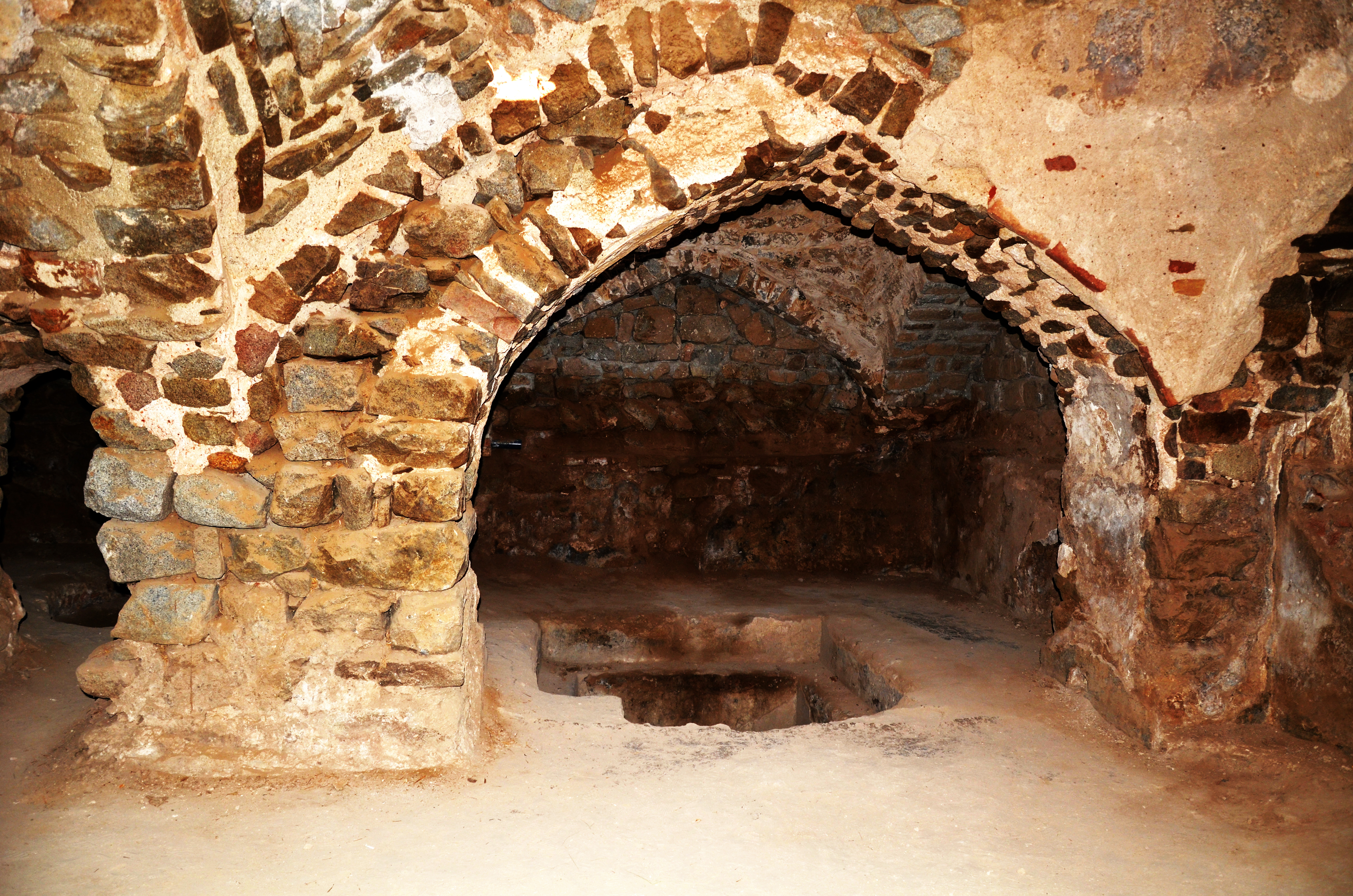 Aras - Kordasht Bath